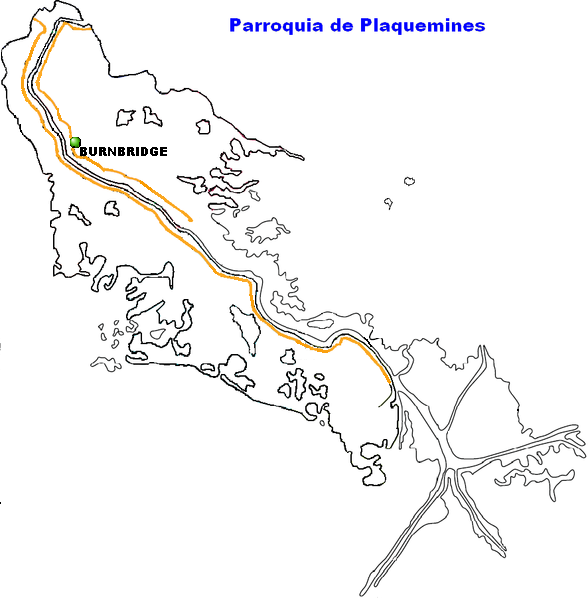 Burnbridge, Louisiana